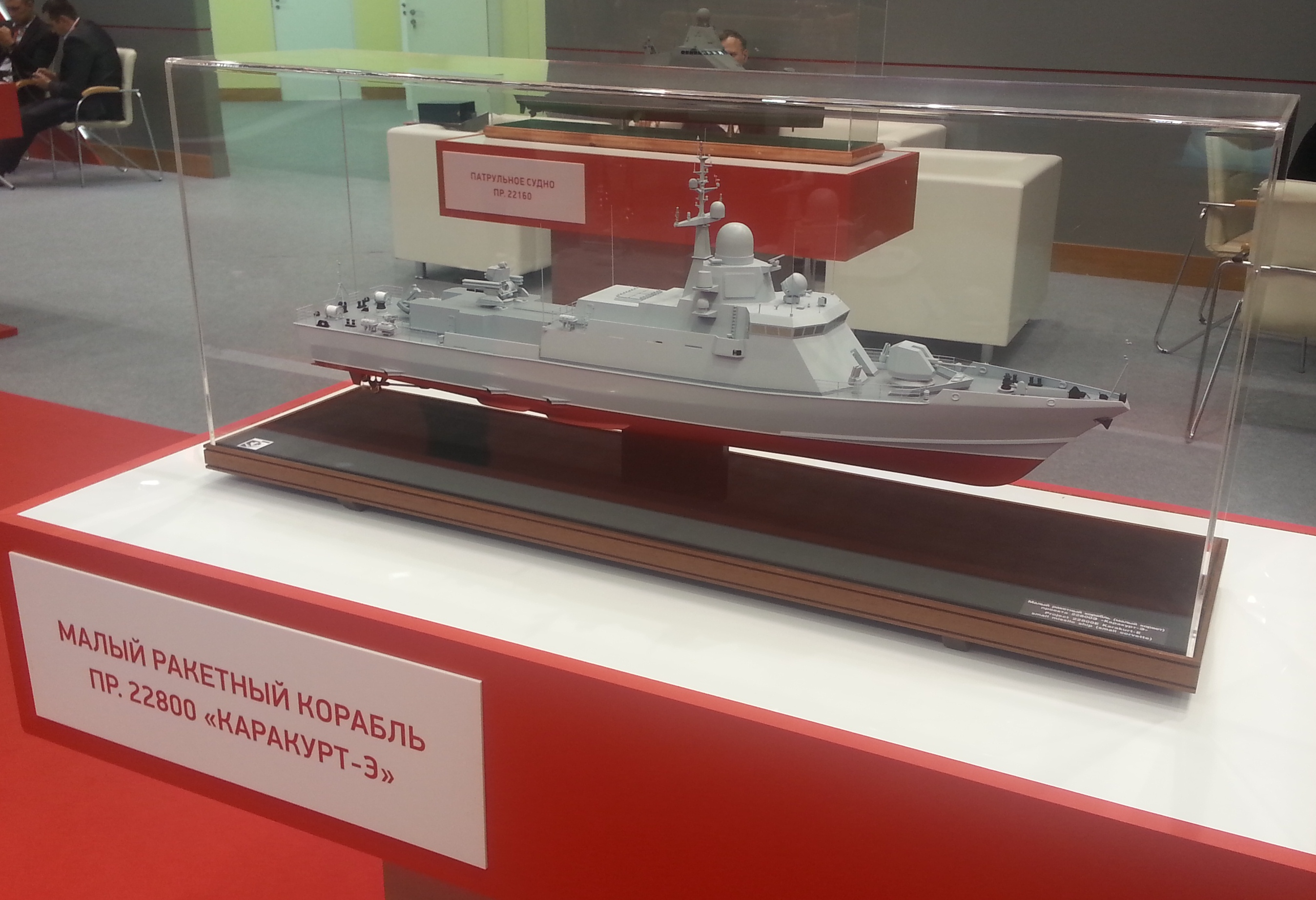 Макет корвета проекта 22800 «Каракурт» на выставке «Армия 2016»